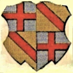 Wappen des Konstanzer Bischofs Otto von Hachberg